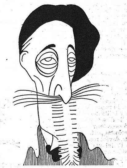 El Gay Saber. Galería cómica dels Mestres vius.